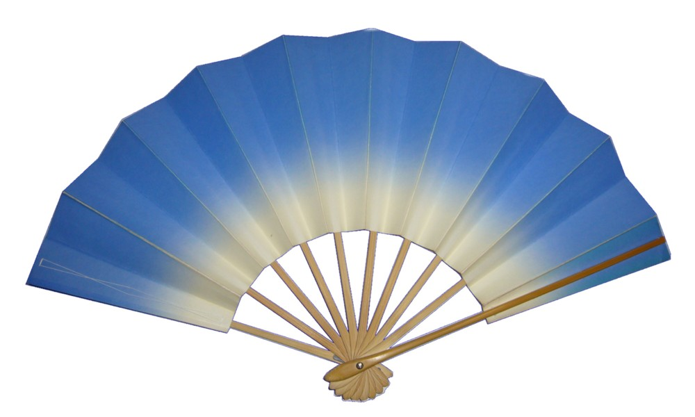 日本舞踊に使われる舞扇（まいおうぎ）。Japanese dancing Fan.